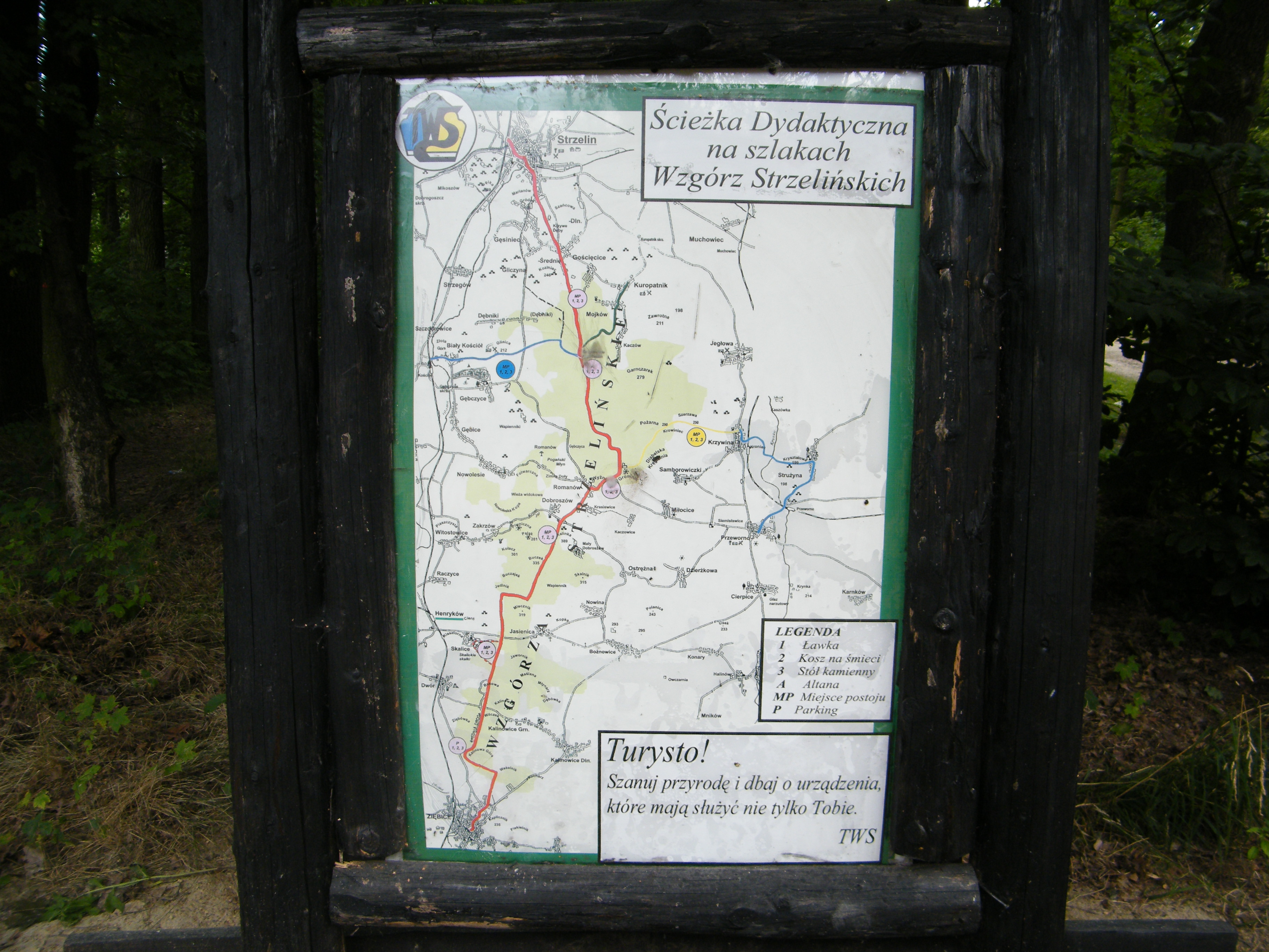 Mapa szlaków turystycznych na Wzgórzach Strzelińskich